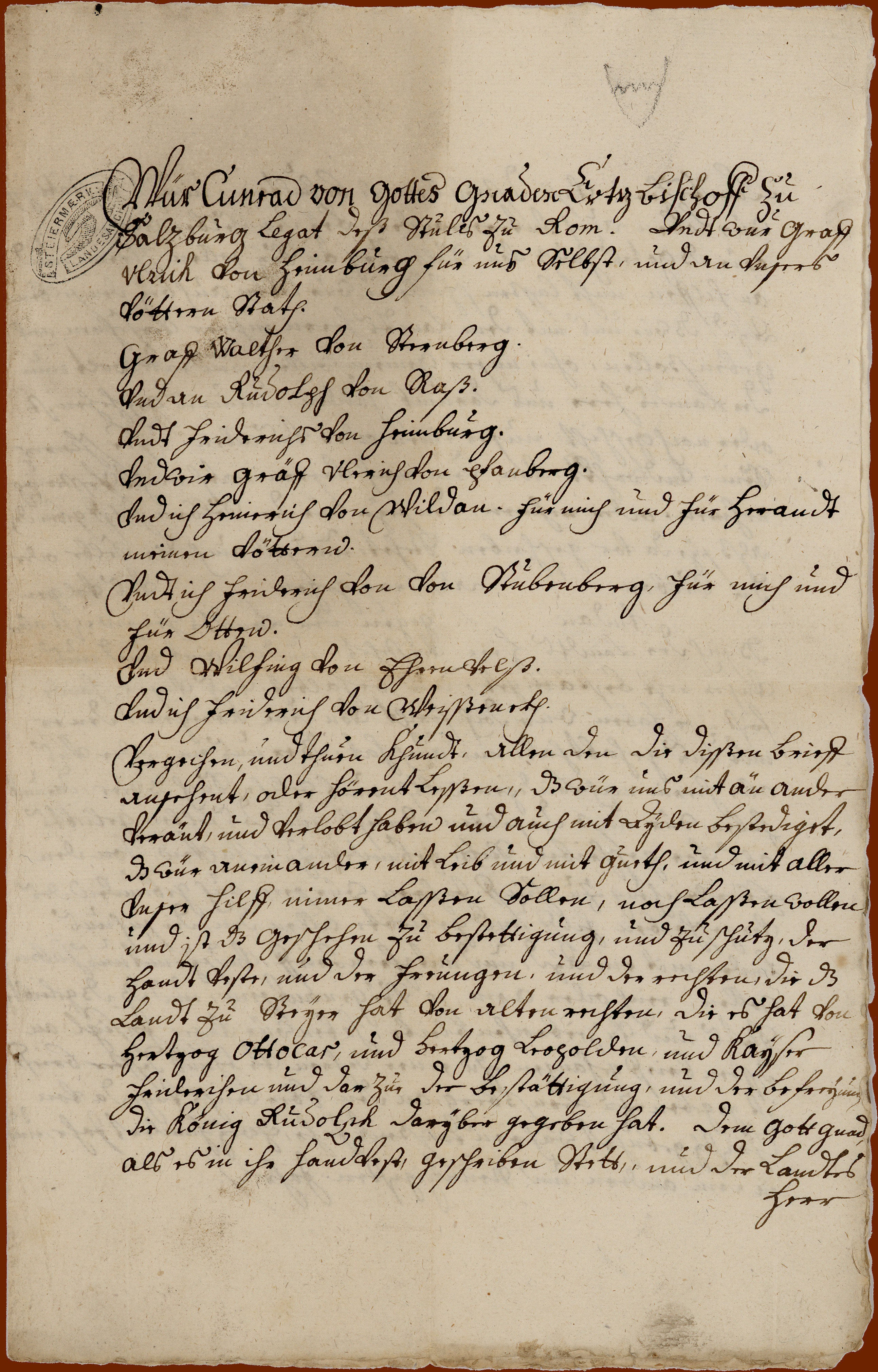 Abschrift der Urkunde des Landsberger Bundes aus dem Jahr 1292, Seite 1